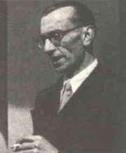 Federico Chabod (Aosta, 1901 – Roma, 1960)